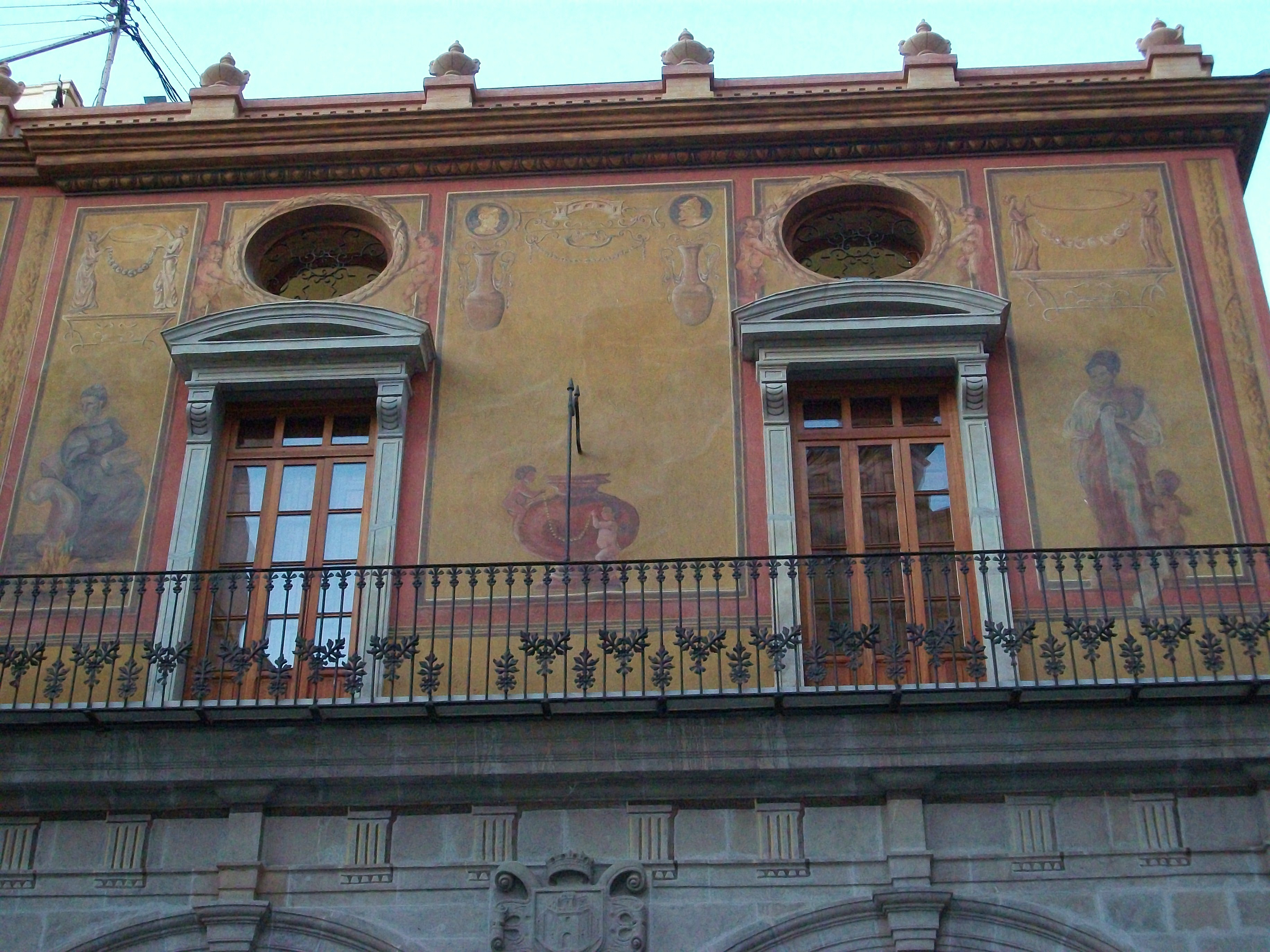 Pintures murals de la llotja del Cànem de Castelló.